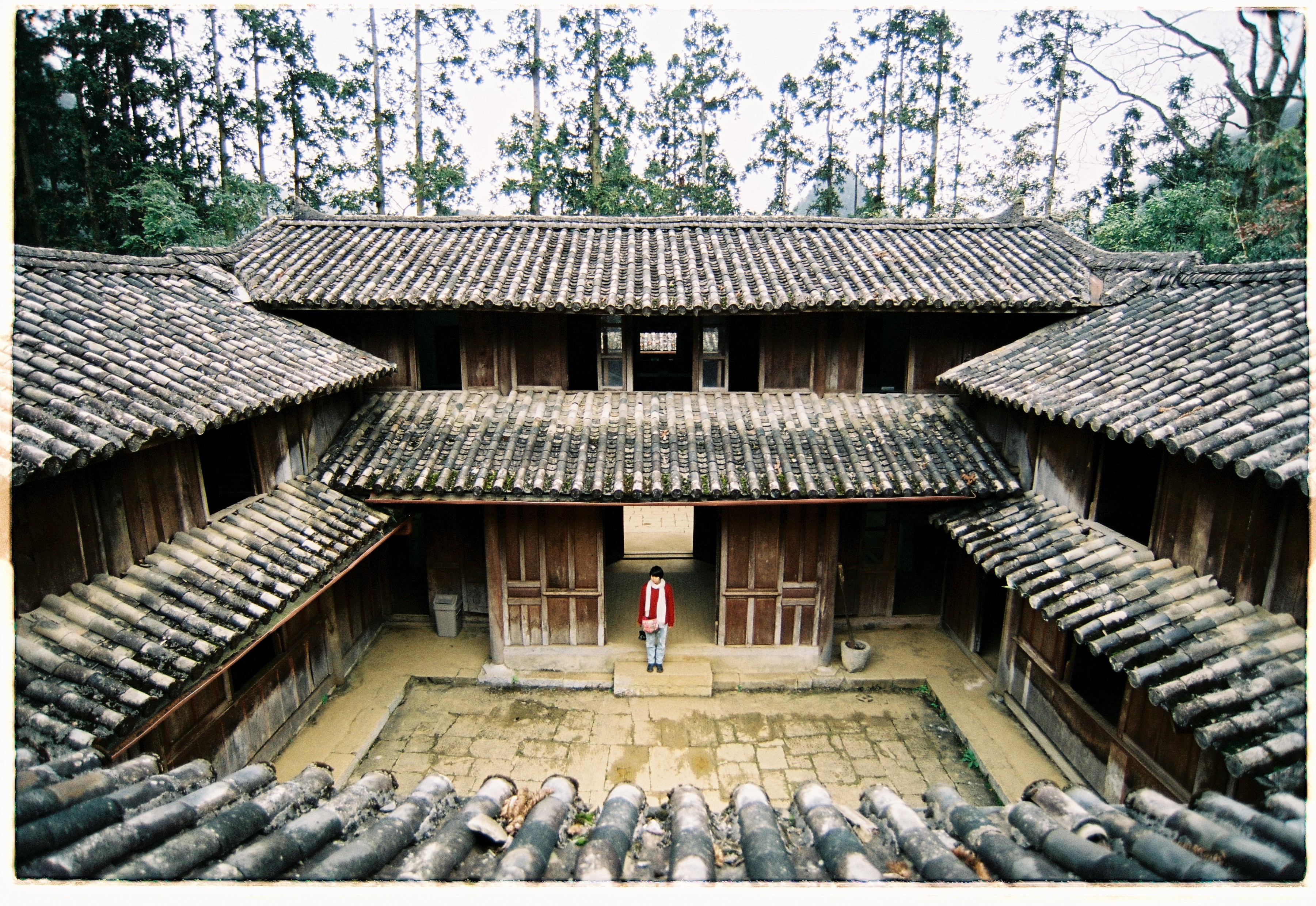 Giữa một vùng núi đá xám xịt, quanh năm khô hạn và mây mù lại xuất hiện một công trình kiến trúc nguy nga theo lối cung điện, lâu đài, thành quách của vương triều phong kiến, đó chính là dinh thự của gia tộc họ Vương - vua Mèo ở vùng cao nguyên đá.